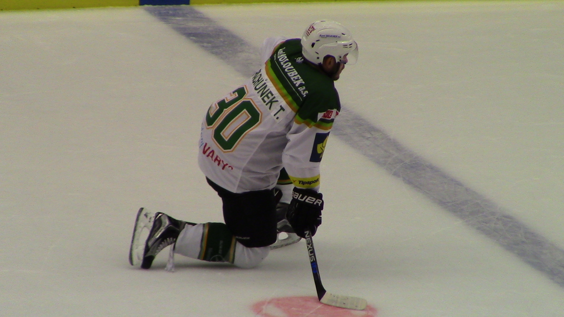 Tomáš Rachůnek